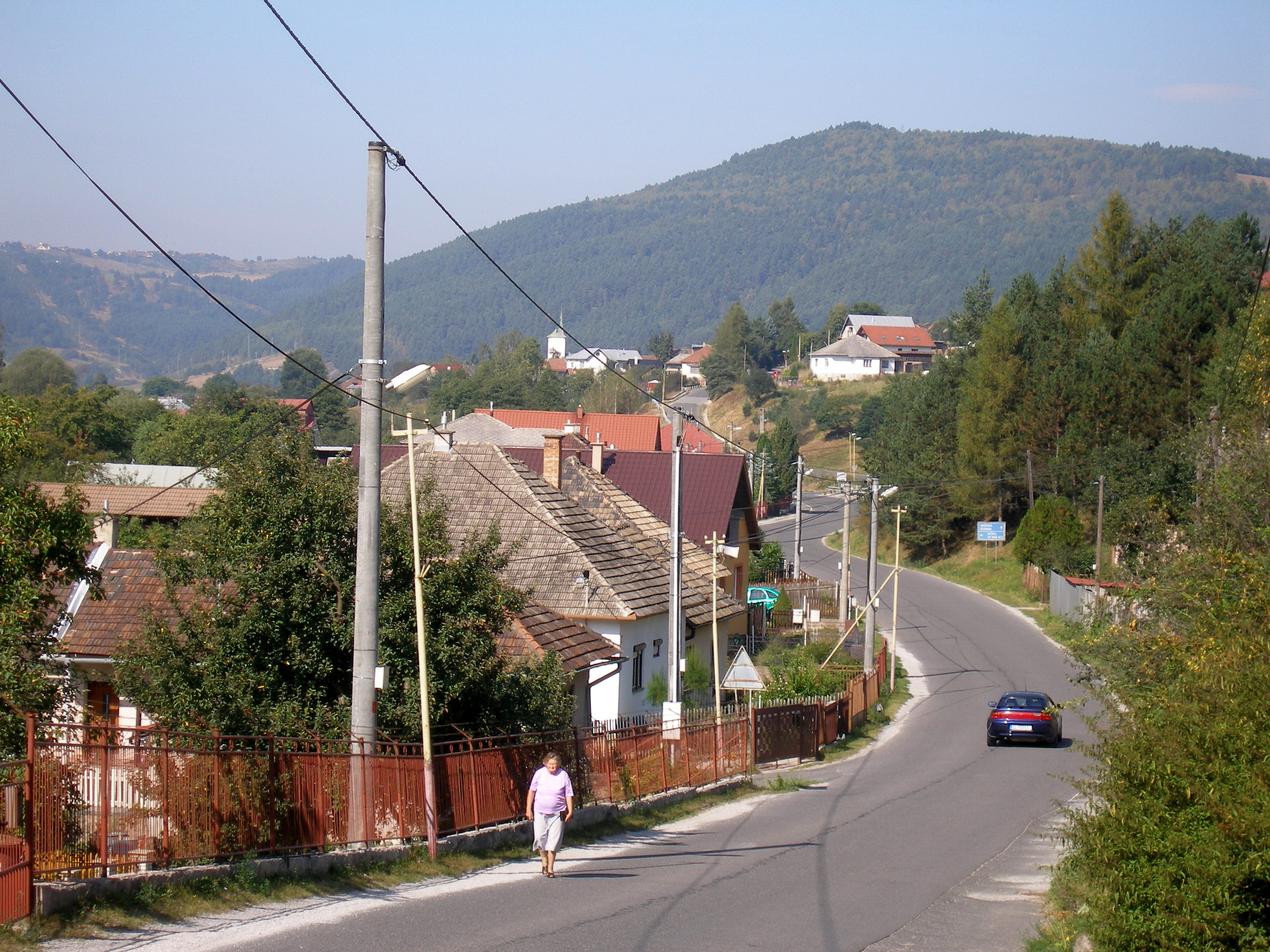 Spišská obec Kluknava okres Gelnica.